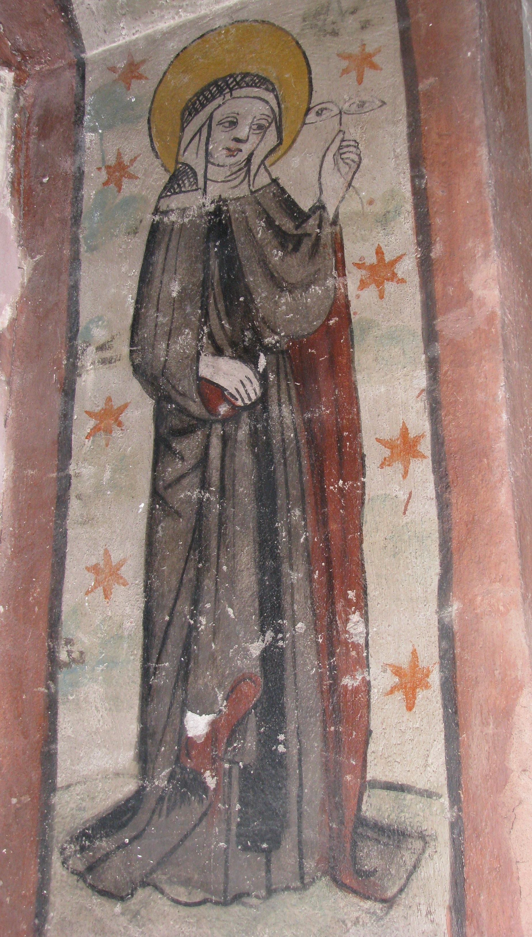 Pfarrkirche St. Vitus, Heidelberg-Handschuhsheim: Fresko aus der 1. Hälfte des 15. Jhs., hl. Odilia